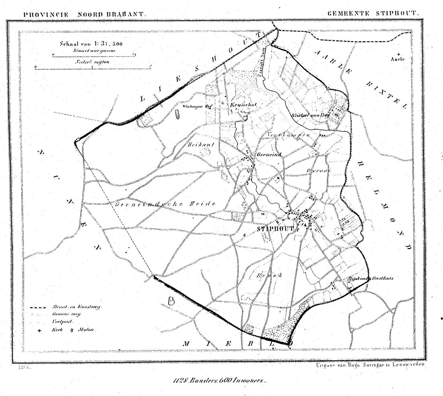 Nederland, Noord-Brabant, Gemeente Stiphout